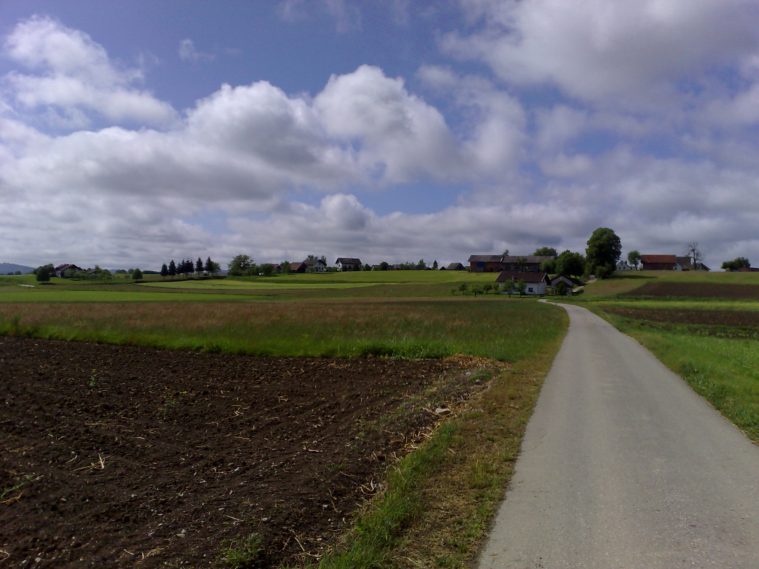 Boršt slikan iz vasi Škrilje